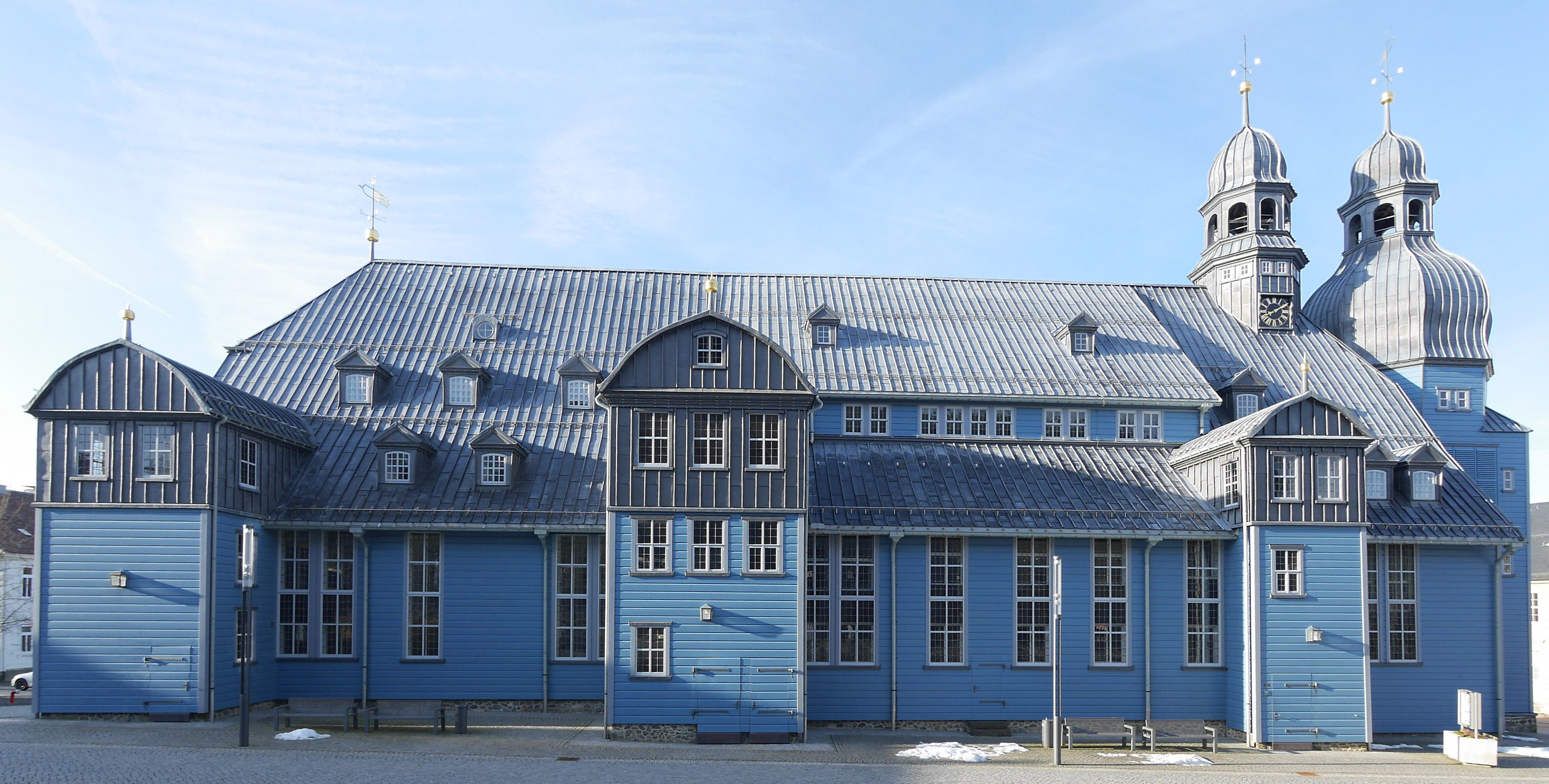 Nordseite der Marktkirche zum Heiligen GeistClausthal-Zellerfeld